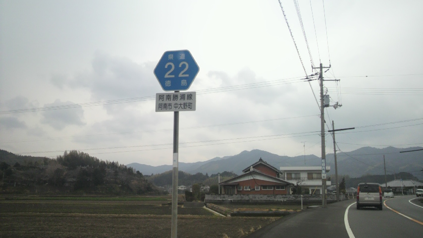 徳島県道22号標識